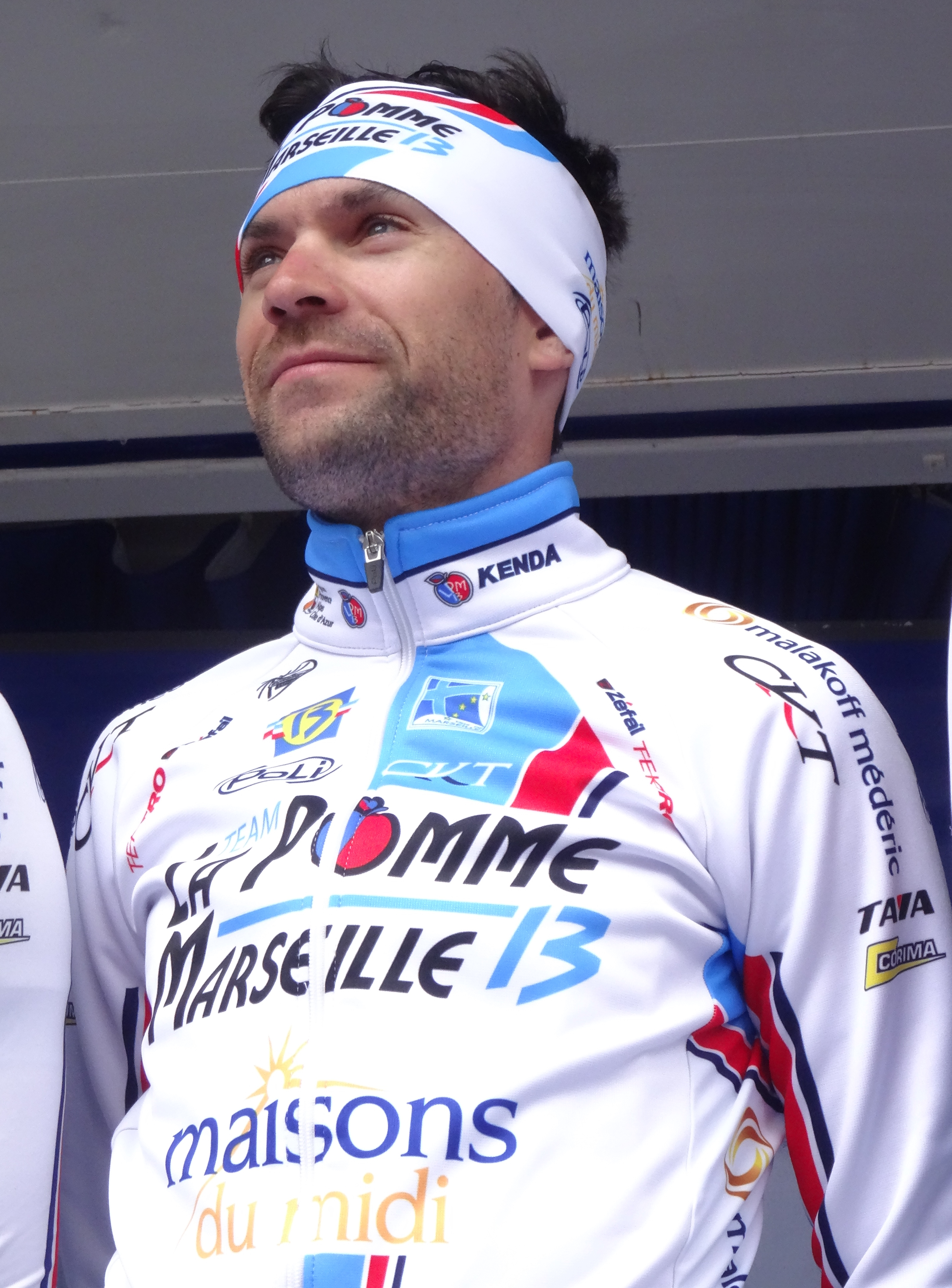 Reportage photographique réalisé le mercredi 7 mai 2014 au départ de la première étape de l'édition 2014 des Quatre jours de Dunkerque à Dunkerque, Nord, Nord-Pas-de-Calais, France. Depicted person: Julien Antomarchi Depicted team: La Pomme Marseille 13